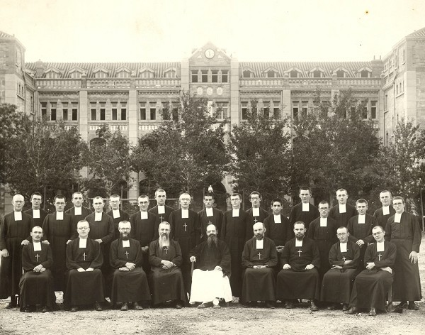 京师私立上义师范学校圣若瑟楼